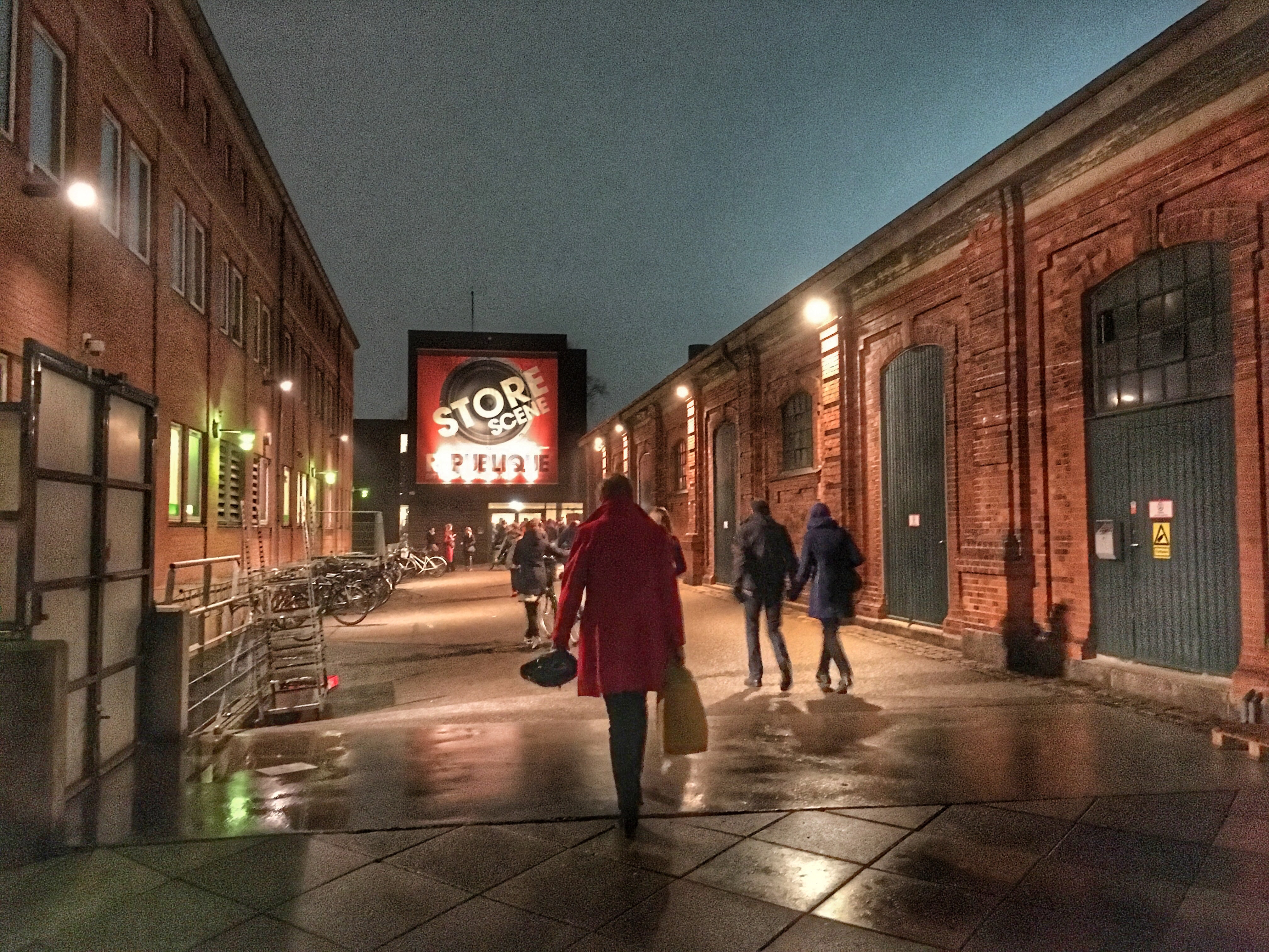 Teatret Republique ved Kanonhallen, Østerfælled Torv, København